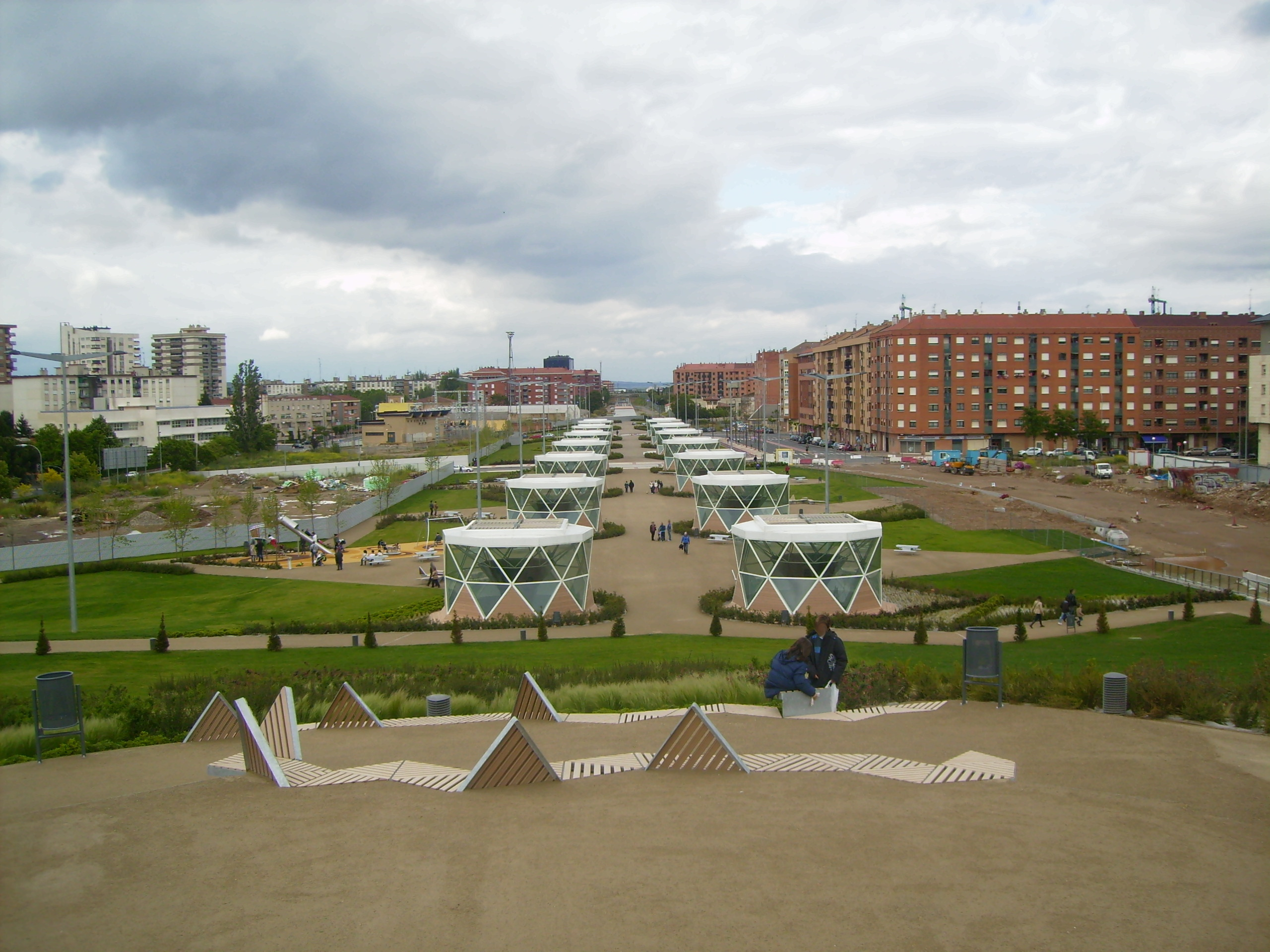 Visión del parque de la estación de logroño